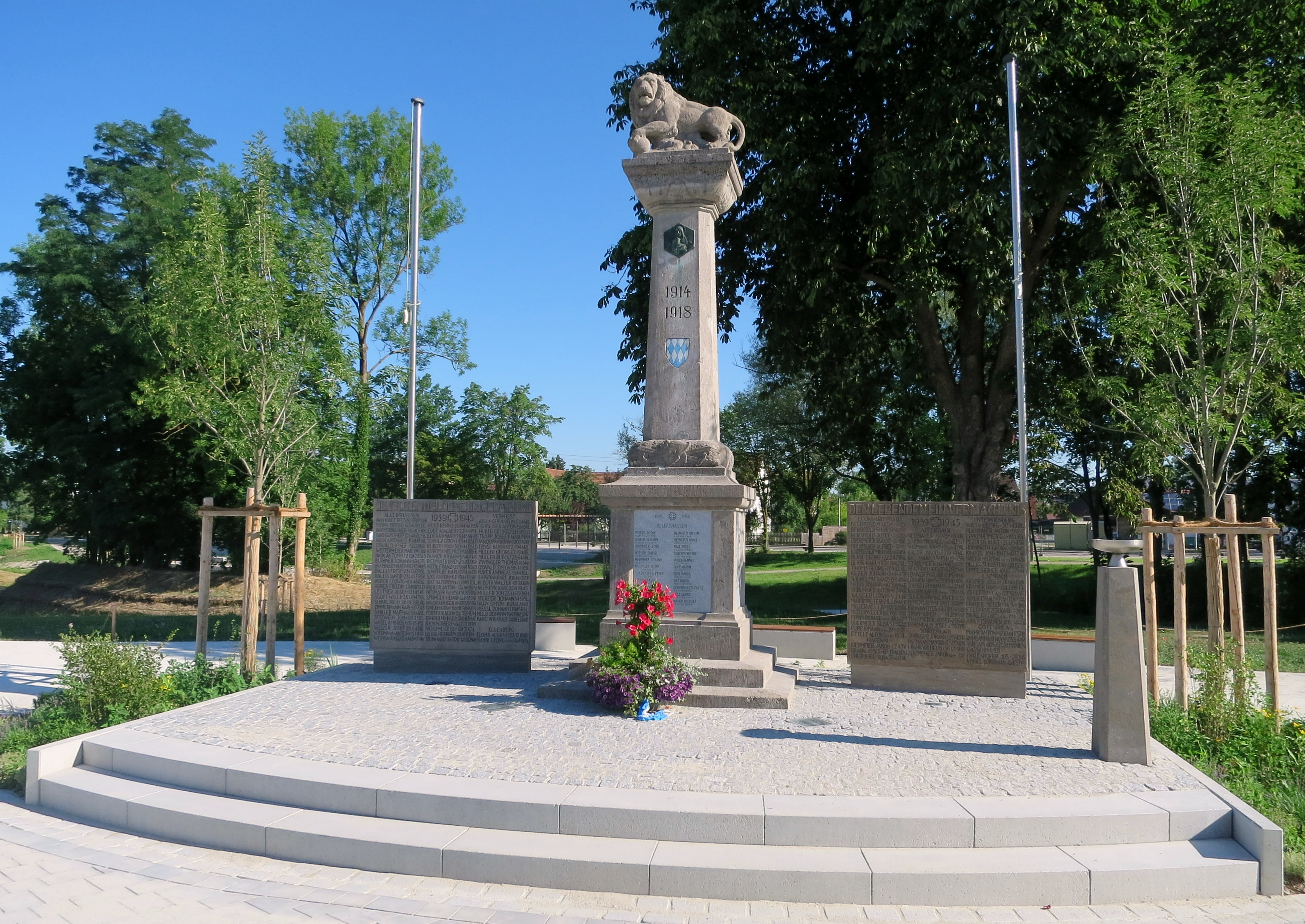 Das renovierte Kriegerdenkmal auf seinem alten Platz von 1927